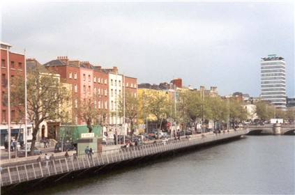 Description: les bords de la Liffey à Dublin Source: Lionel Mure 2003Licence